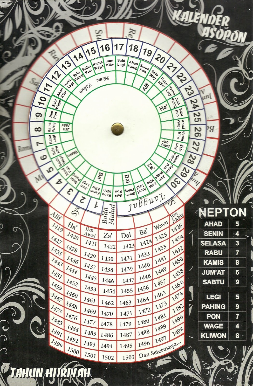 Kalender abadi kurup asapon, dibuat oleh Johan Hudaya dan Witono dari Ponorogo untuk membantu menentukan hari dan pasaran pada penganggalan jawa pada kurup asapon